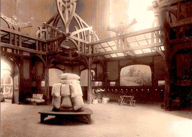 Structure en bois du Pavillon Colonial Expo coloniale de Tervuren 1897